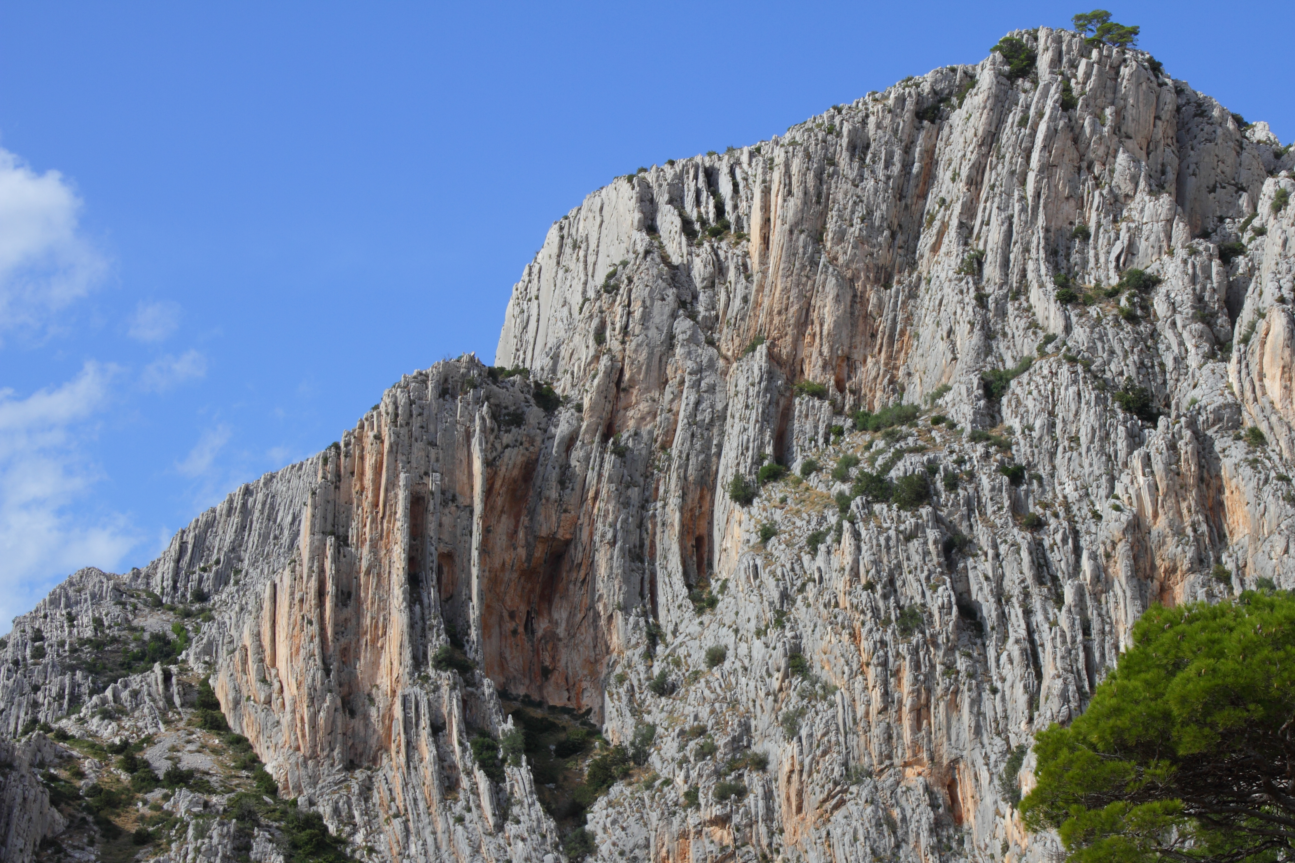 Felswand bei Hvar (Kroatien). Lokalisation der Felswand: 43.142519,16.564543.